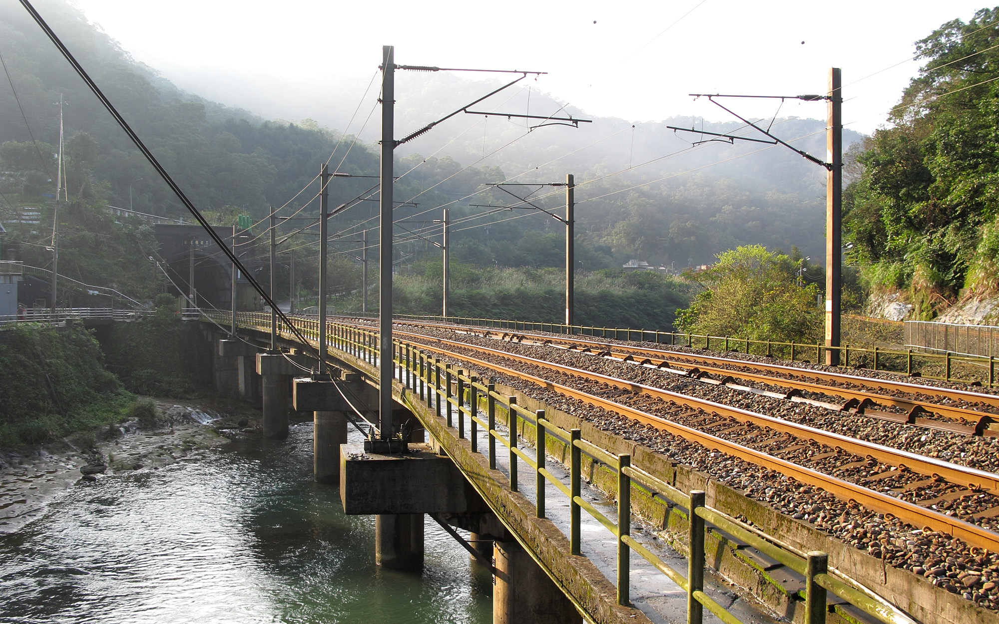 三貂嶺鐵橋